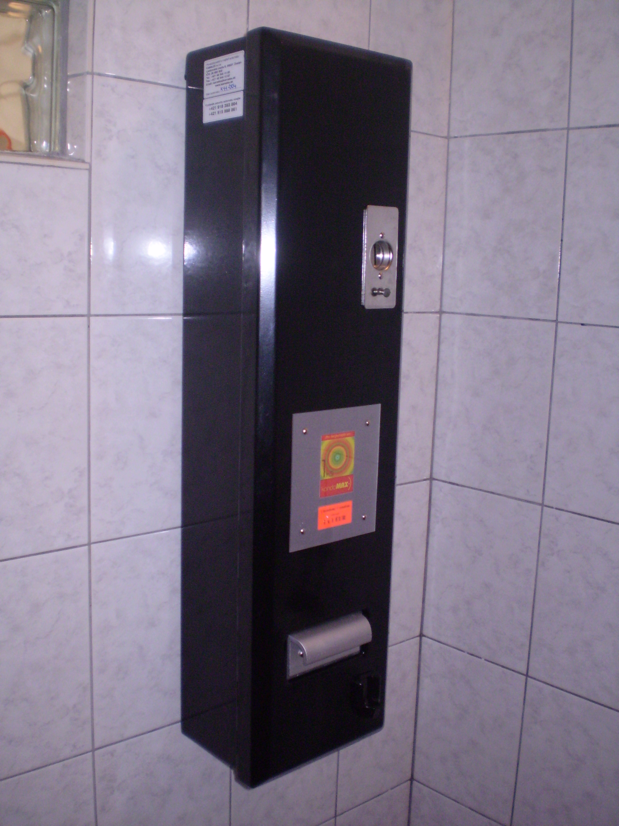 automat na kondómy - SARIKO